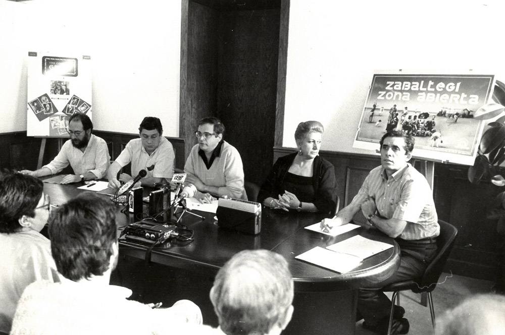 Diego Galan, Pilar Olascoaga, Mariano Ferrer... 1986an Donostiako Zinemaldiko prentsaurreko batean